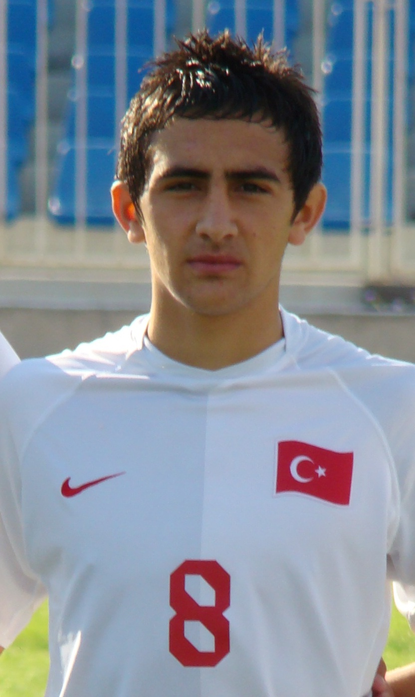 Jem Karacan